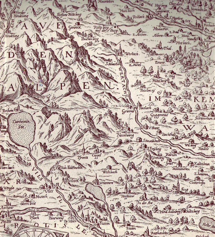 Ausschnitt aus einer Karte des gesamten Illerflussgebietes (Illerae Amnis ac utrinque adiacentis Alemanniae Geographica Descriptio) von 1619: entworfen von Johann Christoph Hurter und in Kupfer gestochen von Raphael Custos (Custodis). Das Blatt zeigt einen Teil des Allgäus mit dem Quellgebiet der Wertach u. a. und Orten zum Beispiel wie Füssen und Nesselwang.